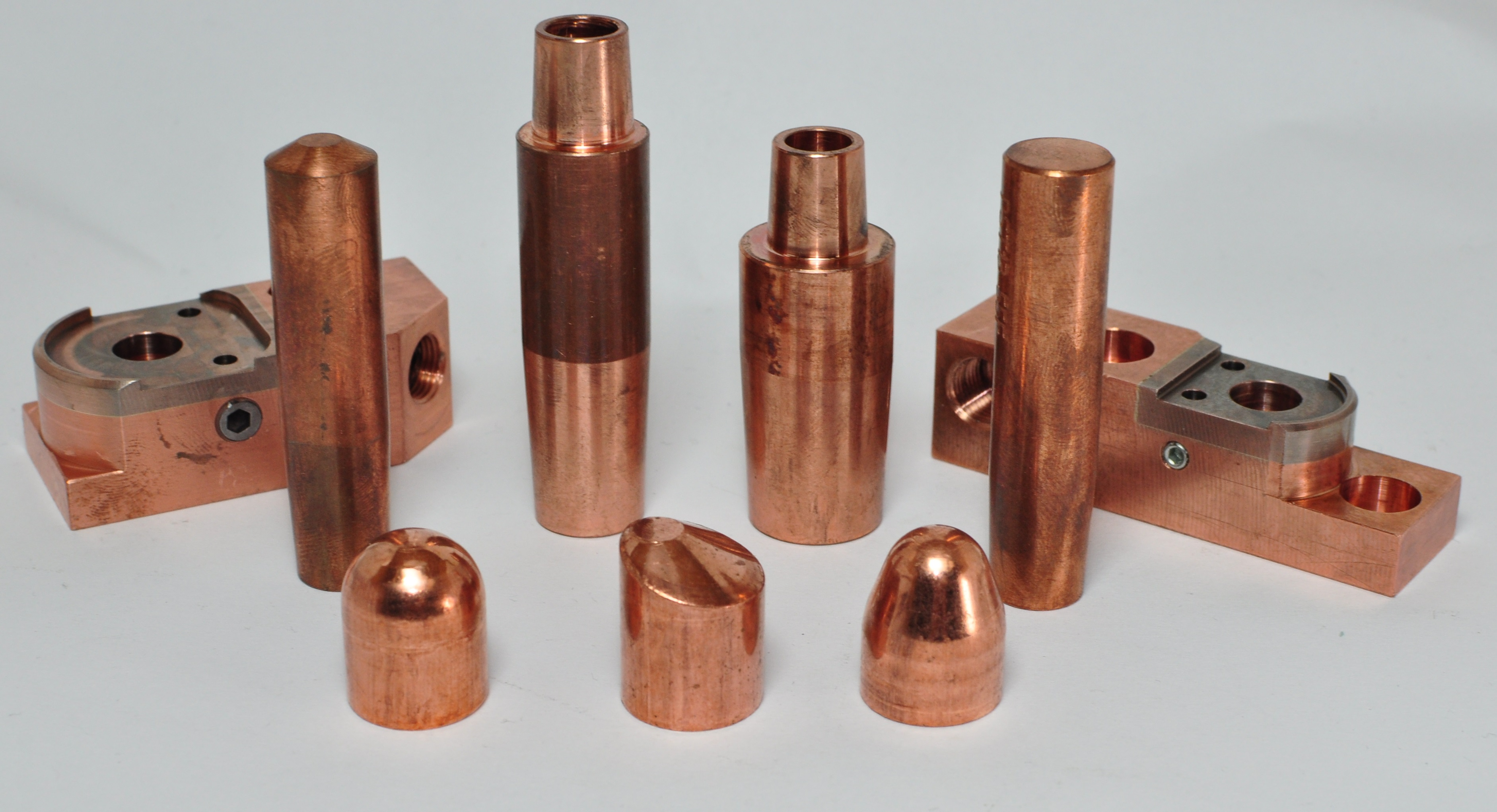 Spot welding electrodes